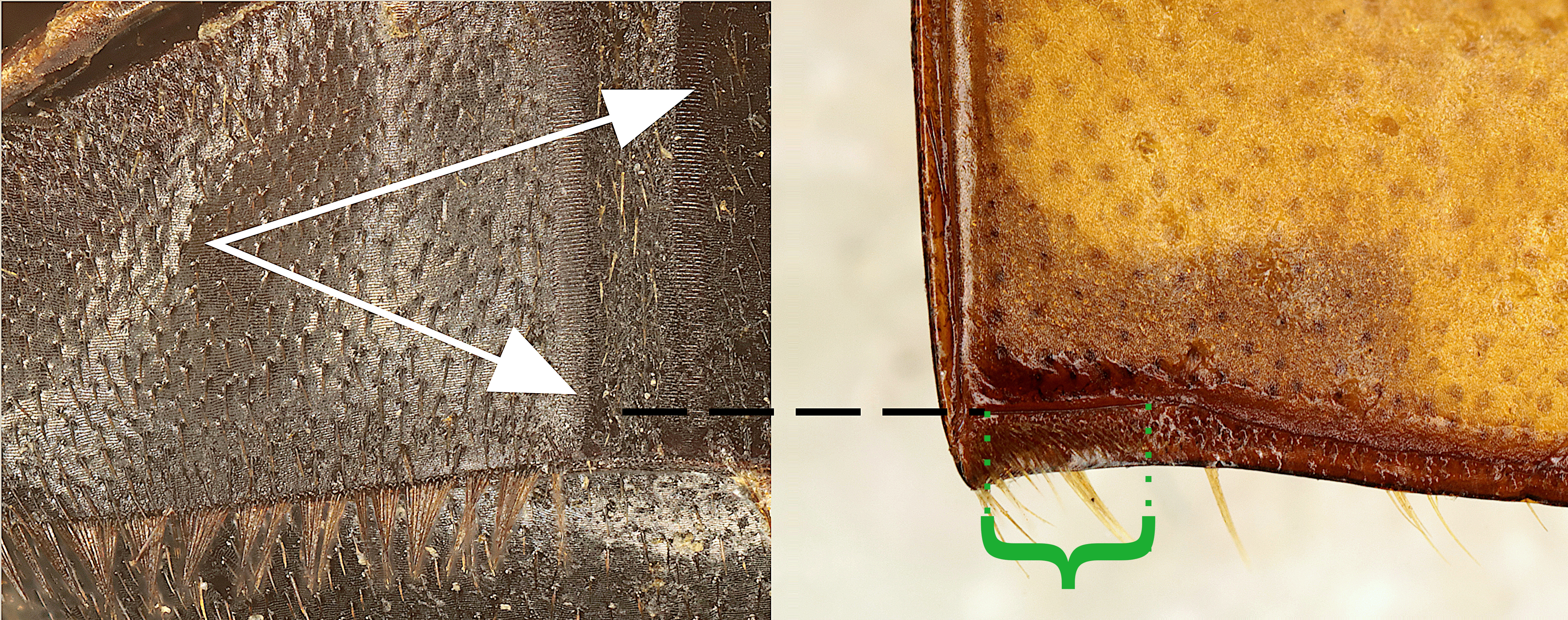 Stridulationsorgan von Nicrophorus interruptus-Weibchen, links Ausschnitt Tergit mit den beiden Schrillleisten (weiße Pfeile), rechts Ausschnitt der Unterseite der linken Flügeldecke im Bereich des Nahtwinkels, grün: Länge der Schrillkante